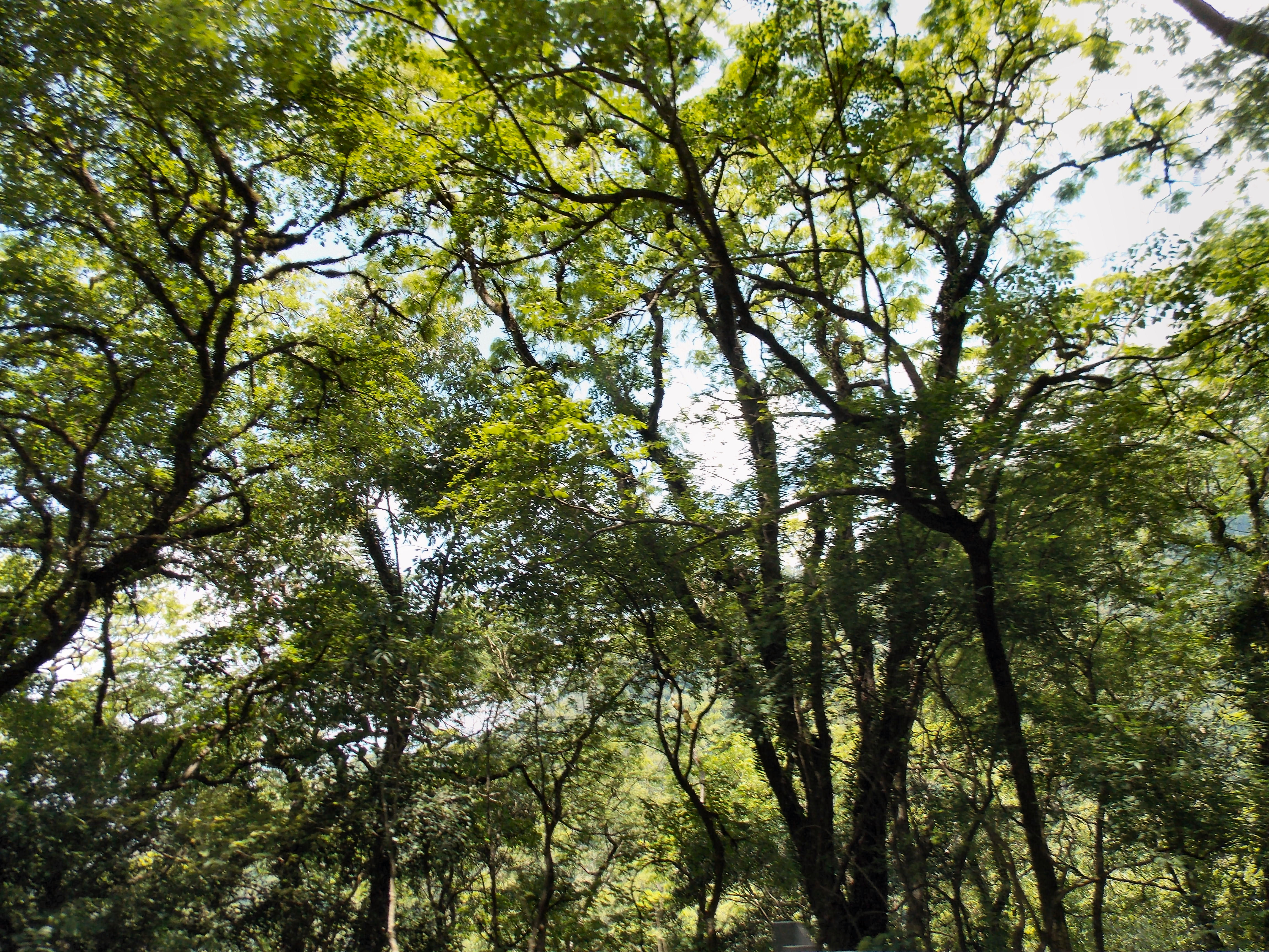 Detalle de la vegetación del parque